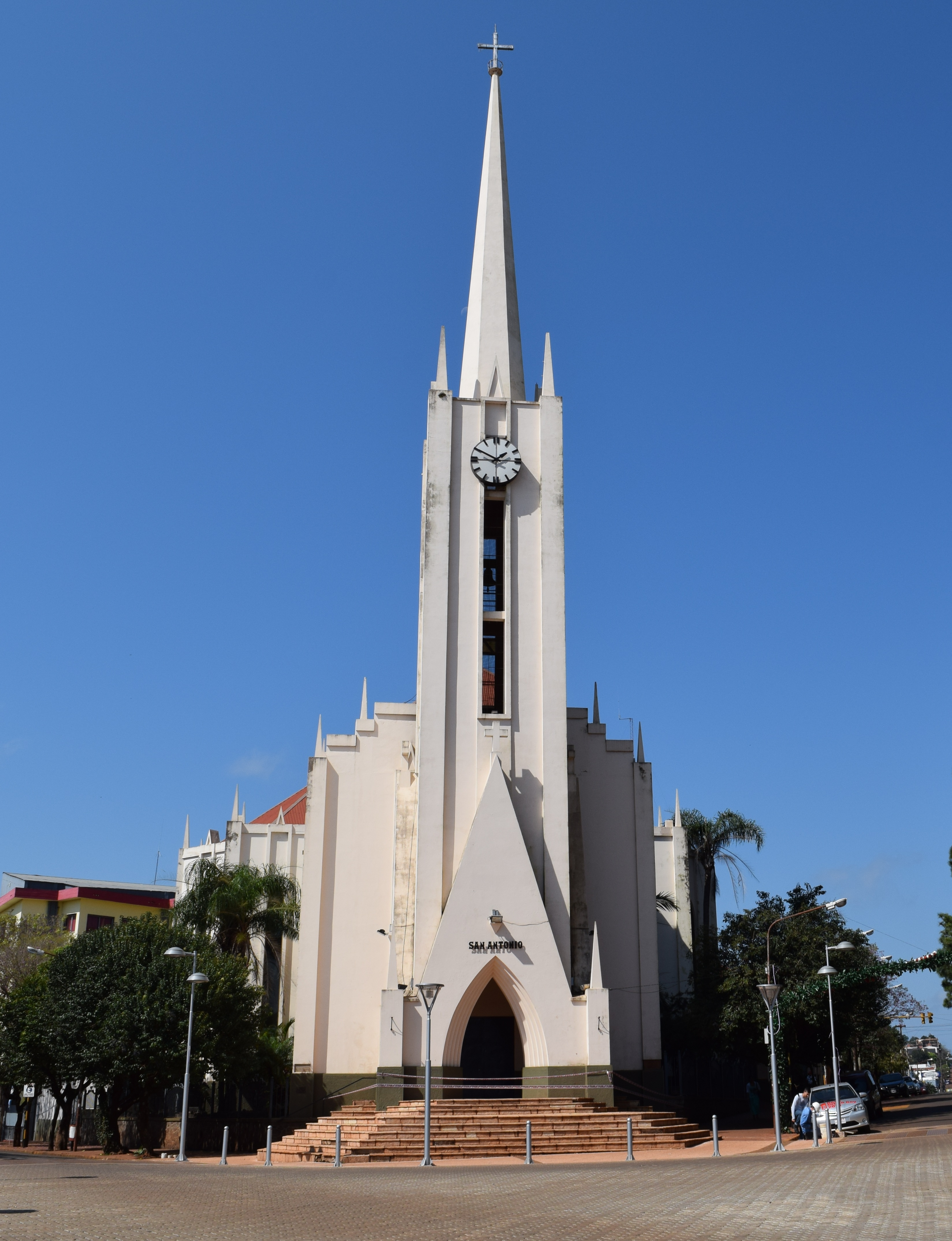 La Catedral San Antonio de Padua de Oberá, Misiones, Argentina.